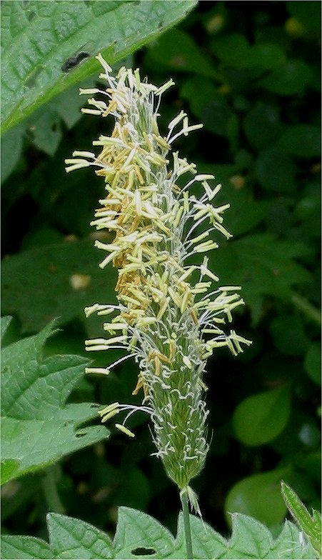 Alopecurus pratensis (Grote vossenstaart